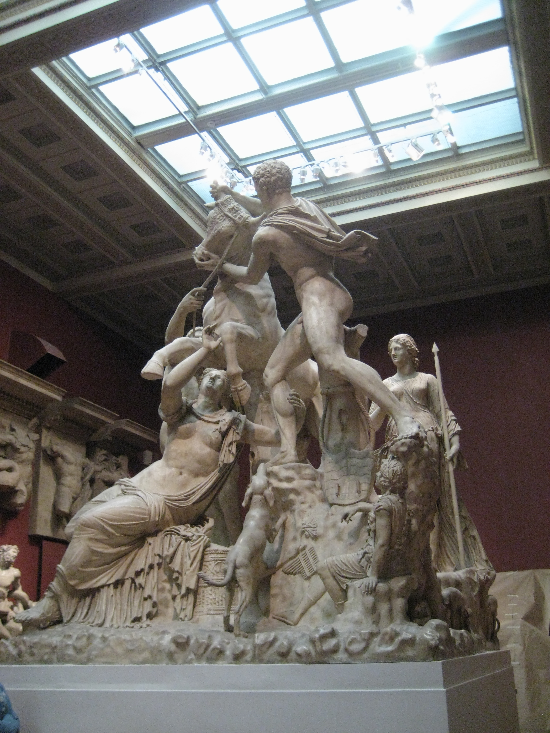 Фарнезский бык. Слепок